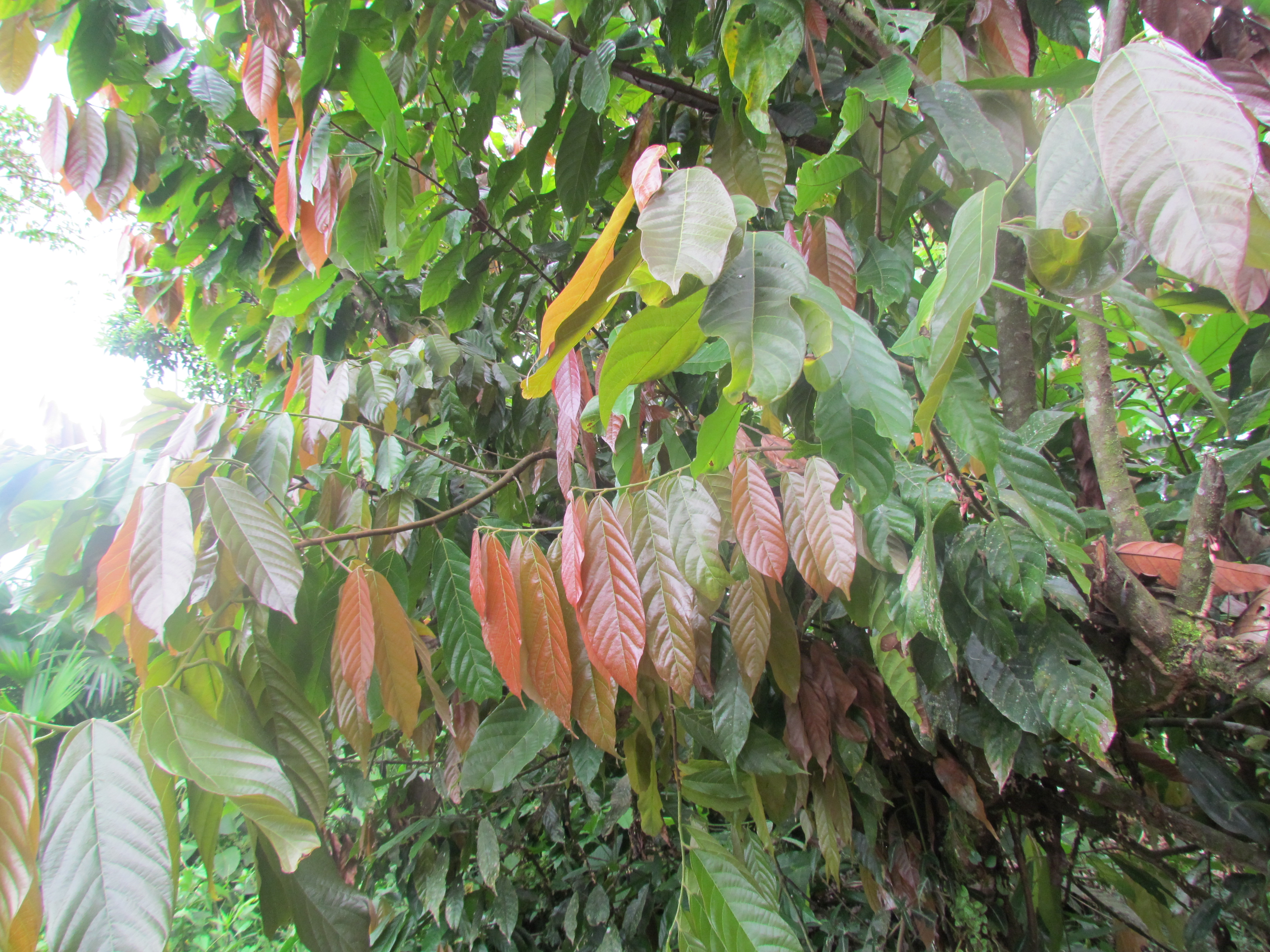 Arbusto,La infusión preparada con las hojas de esta planta, es utilizada como estimulante para tratar la depresión y problemas de nervios. También se la utiliza para dolores estomacales y hay quienes hablan de su poder como afrodisíaco y revitalizante.